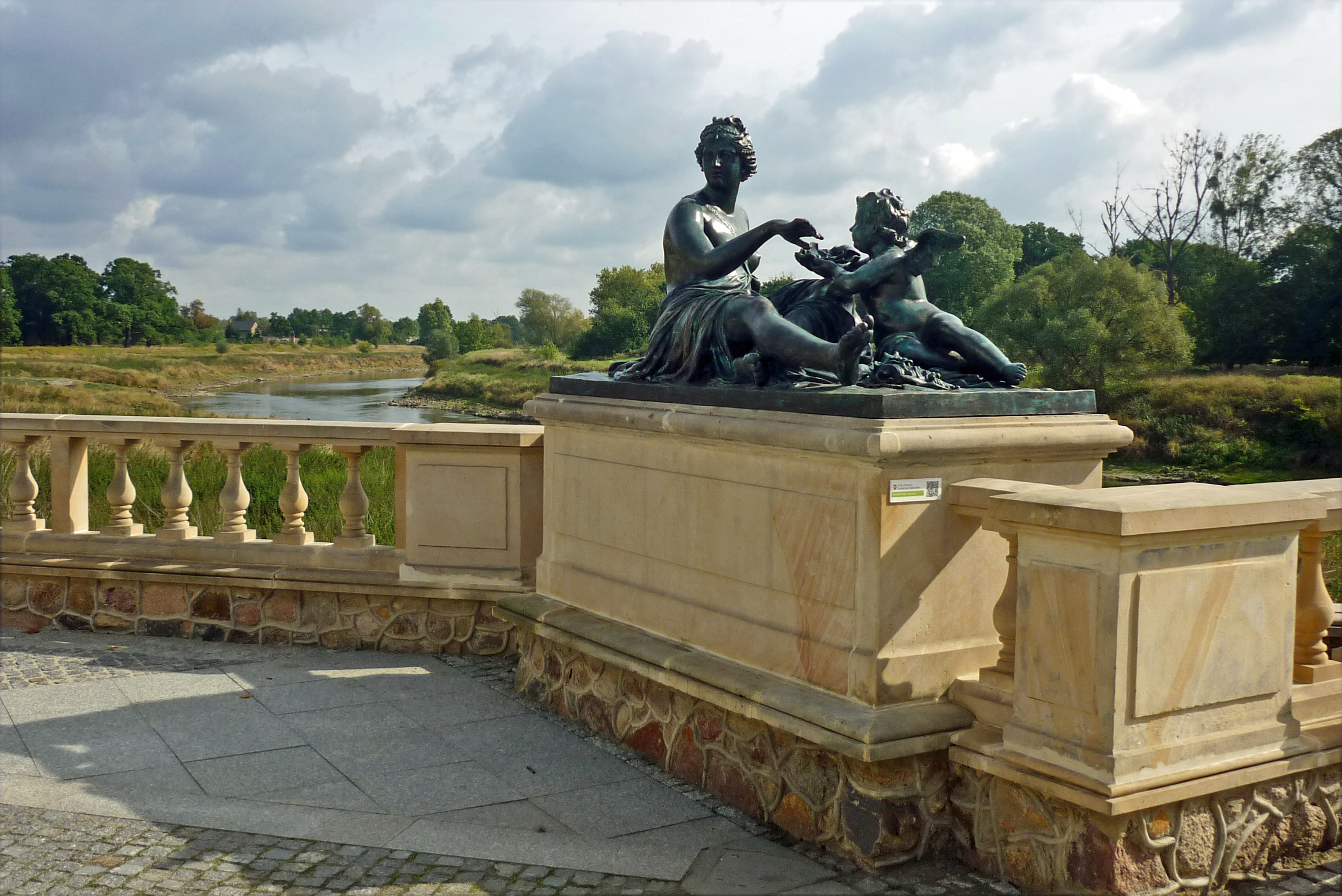 Bronzeplastik im Park von Schloss Dyhernfurth/Brzeg Dolny - Nachbildungen der Plastiken franz. Flüsse aus dem Park von Versailles, siehe z.B. (File:Statue au bord d'un bassin château de Versailles.JPG)